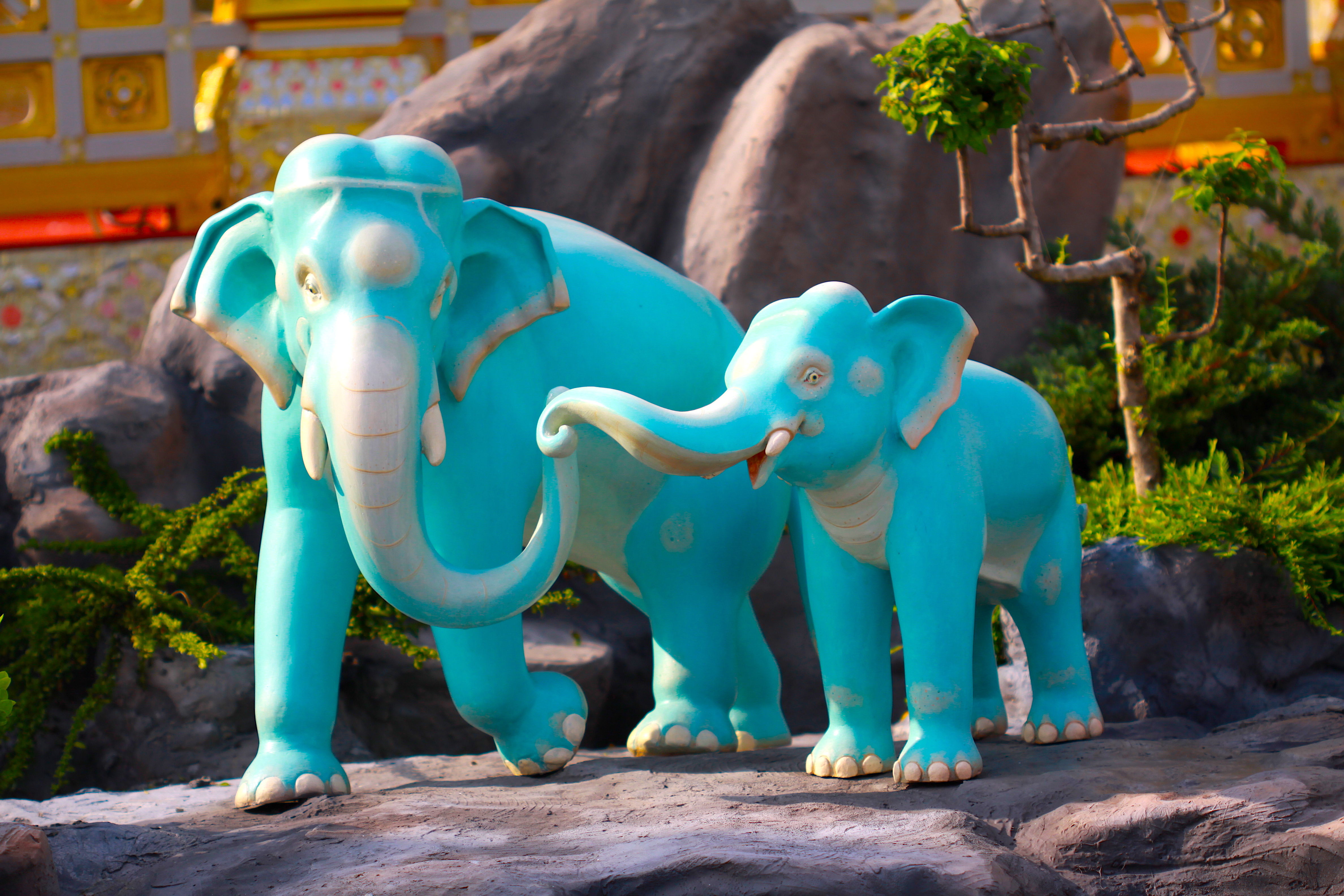 ประติมากรรม "สัตว์หิมพานต์ "รอบพระเมรุมาศ ในพระราชพิธีถวายพระเพลิงพระบรมศพพระบาทสมเด็จพระปรมินทรมหาภูมิพลอดุยเดช